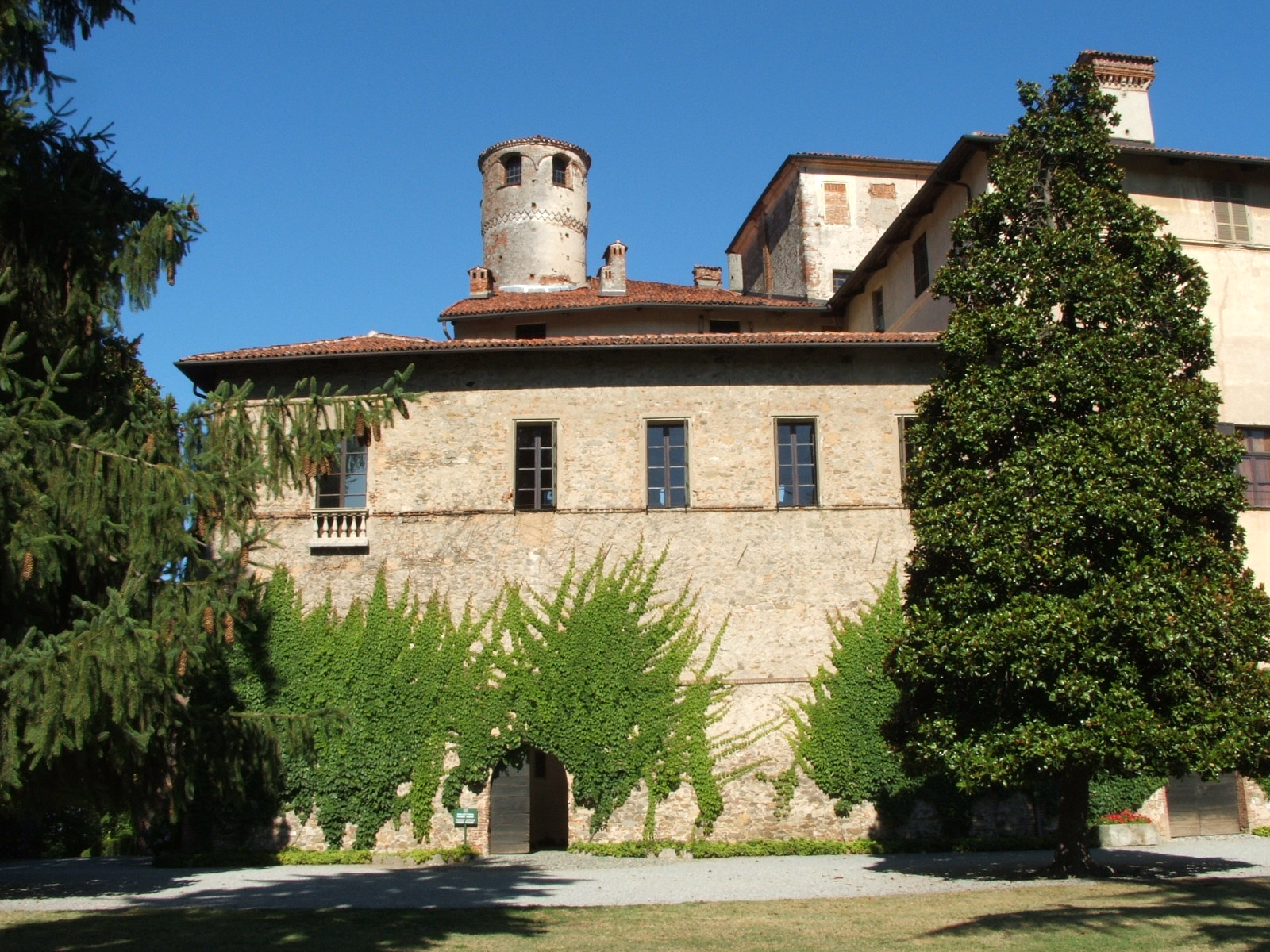 Manta (provincia di Cuneo) - Castello della Manta